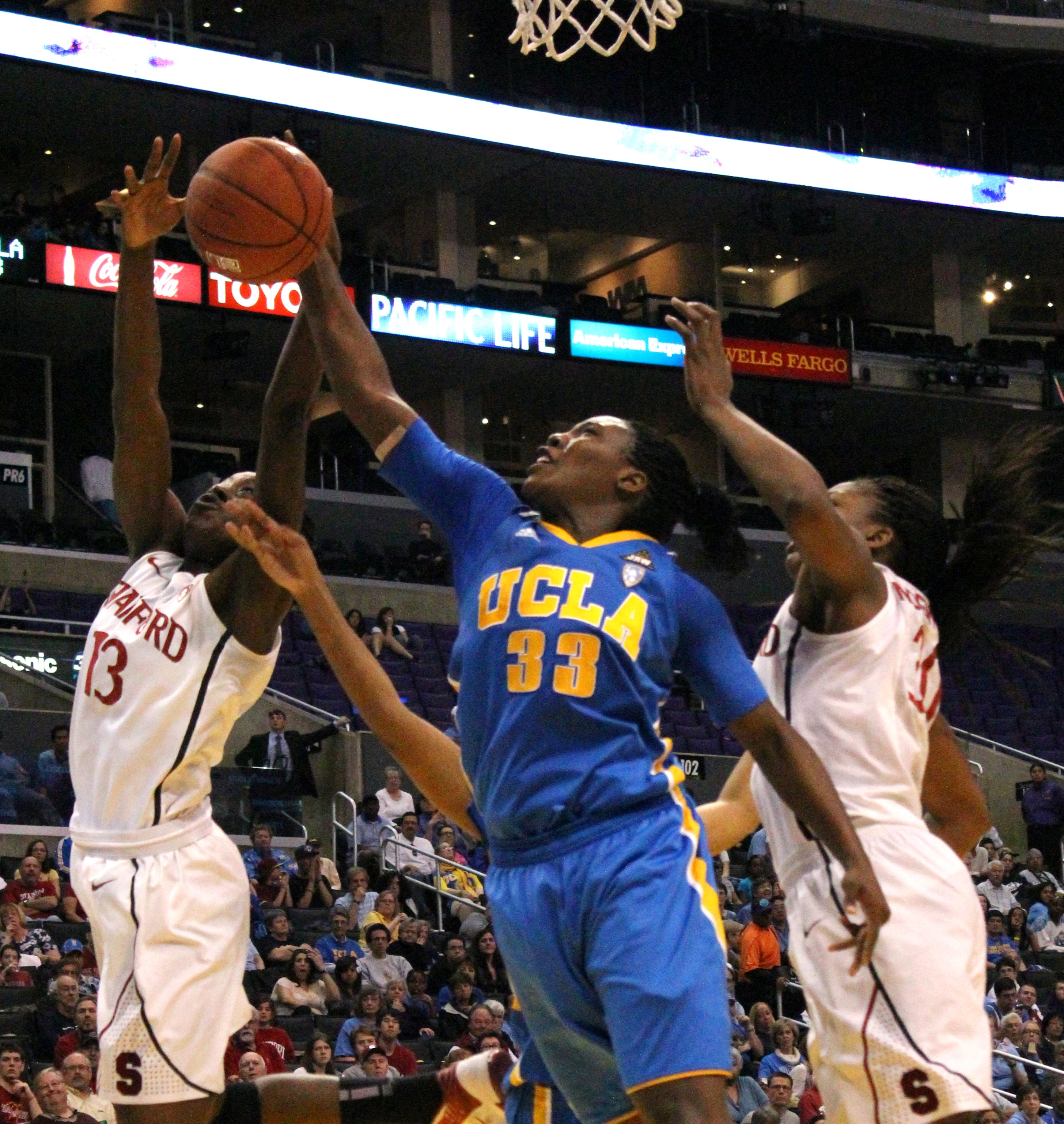 Jasmine Dixon (UCLA) prend le rebond devant les soeurs Chiney et Nnemkadi Ogwumike (Stanford) lors du tournoi de la Pac10.